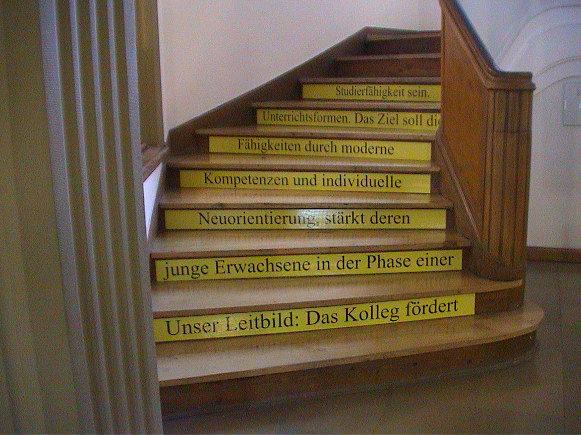 Visualisierung unseres Leitbildes in unserem Treppenhaus